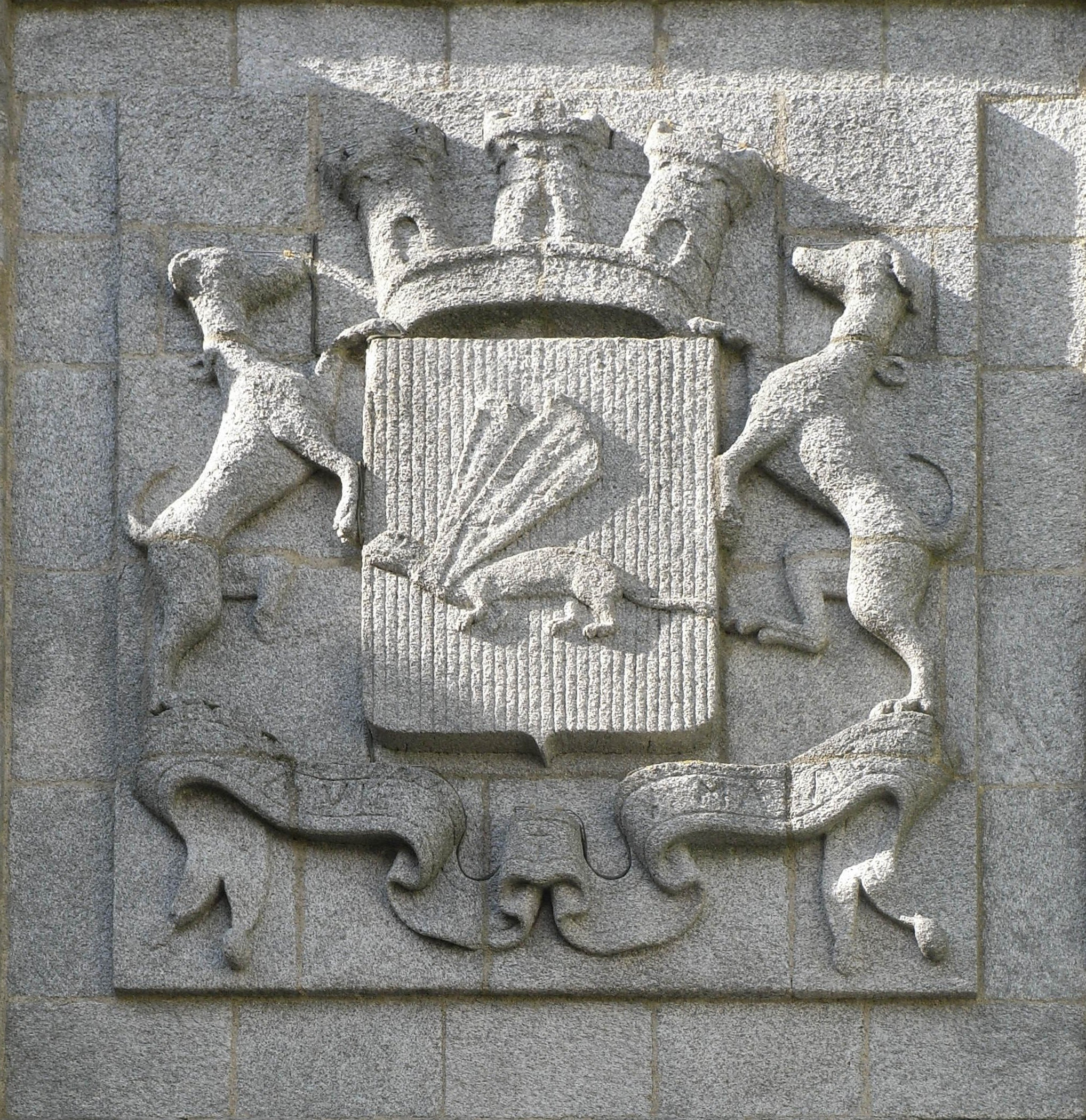 Blason de la Porte Saint-Vincent avec l'hermine, les deux lévriers, la couronne murale à trois tours (pour préfecture) & la devise A MA VIE. Ville de Vannes (Morbihan - Bretagne - France) .